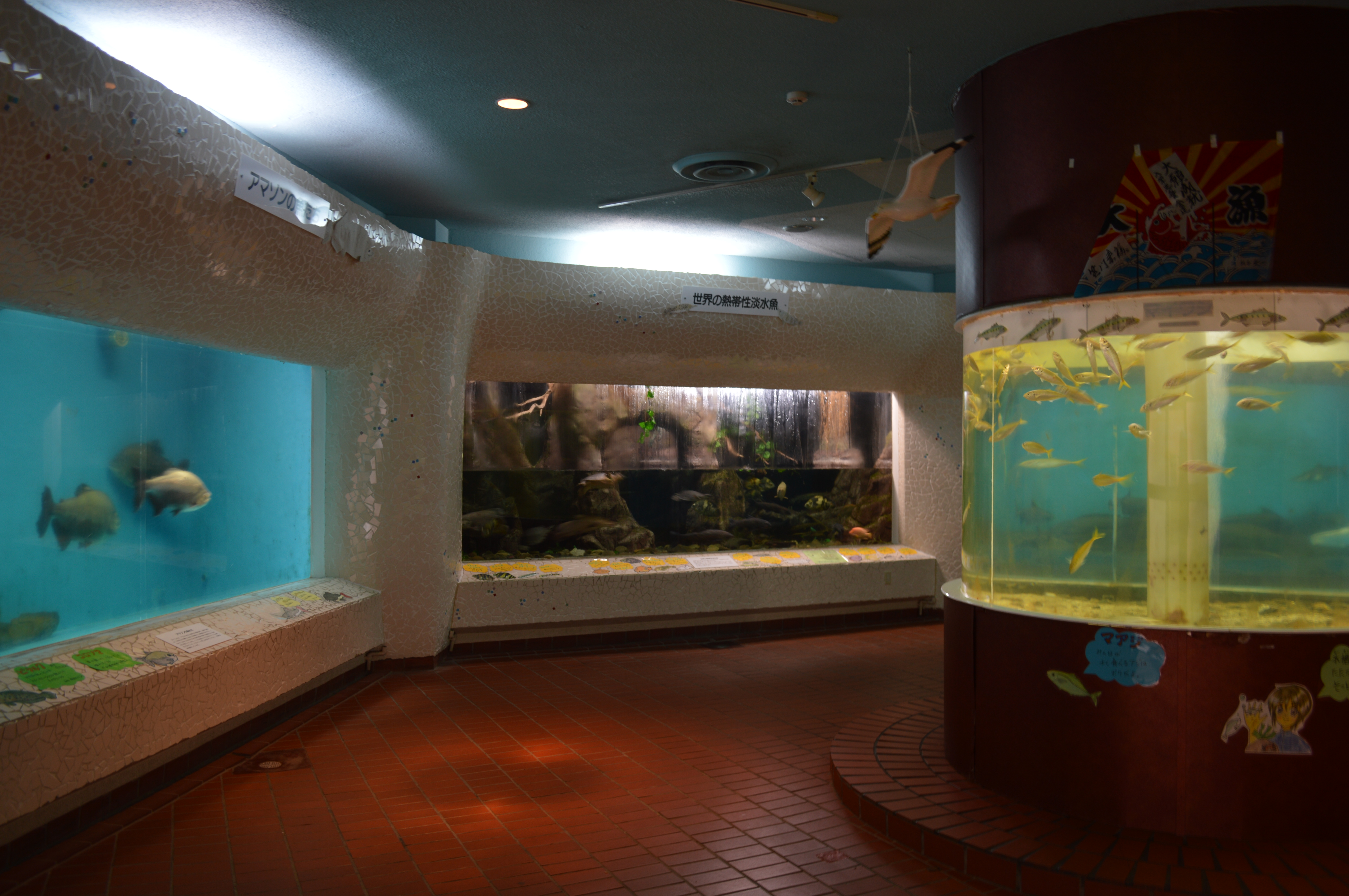 千葉県銚子市にある犬吠埼マリンパーク